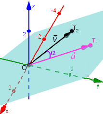 Агол помеѓу два радиус вектори во простор